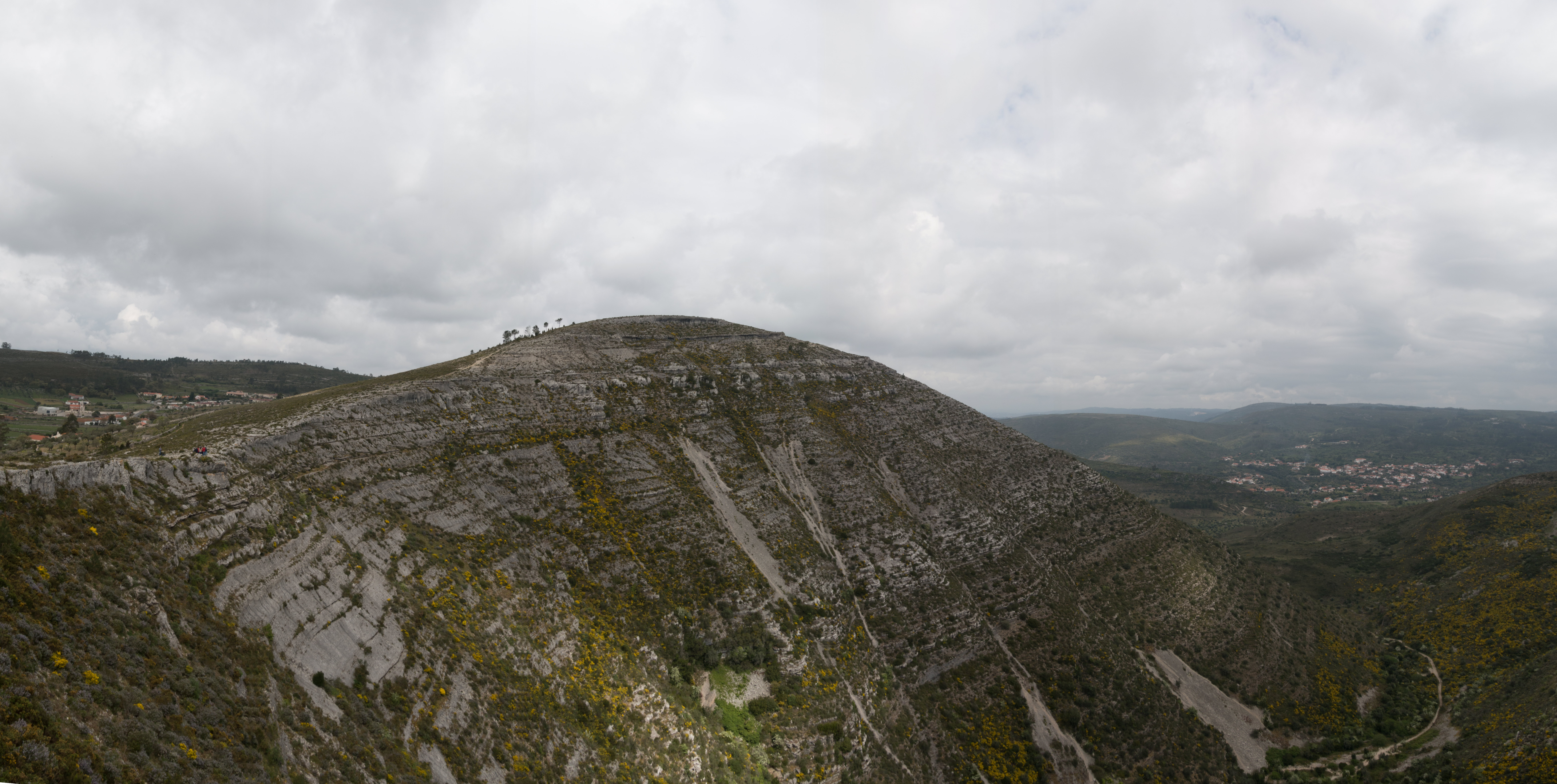 This is a photography of a Site of Community Importance in Portugal with the ID: PTCON0015. Natura2000 entry, EEA entry Vale da Fórnea Parque Natural da Serra de Aire e Candeeiros This is a photography of a Site of Community Importance in Portugal with the ID: {| cellspacing="0" style="text-align:left; color:#000; background:#E1F5A9; border:1px solid #bbb; margin:1px; direction:ltr;" class="layouttemplate" This is a photography of a Site of Community Importance in Portugal with the ID: PTCON0015. Natura2000 entry, EEA entry . [ cellspacing="0" style="text-align:left; color:#000; background:#E1F5A9; border:1px solid #bbb; margin:1px; direction:ltr;" class="layouttemplate" | style="width:25px; height:25px;" | | style="font-size:10pt; padding:3pt; line-height:1.1em;" | This is a photography of a Site of Community Importance in Portugal with the ID: PTCON0015. Natura2000 entry, EEA entry |} Natura2000 entry], [ cellspacing="0" style="text-align:left; color:#000; background:#E1F5A9; border:1px solid #bbb; margin:1px; direction:ltr;" class="layouttemplate" | style="width:25px; height:25px;" | | style="font-size:10pt; padding:3pt; line-height:1.1em;" | This is a photography of a Site of Community Importance in Portugal with the ID: PTCON0015. Natura2000 entry, EEA entry |} EEA entry] |} Category:Sites of Community Importance in Portugal with known IDs| This is a photography of a Site of Community Importance in Portugal with the ID: PTCON0015. Natura2000 entry, EEA entry